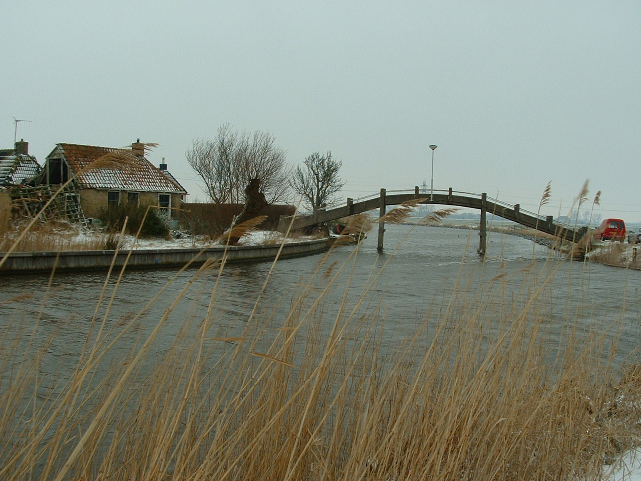 betonnen 'Heechhout', letterlijk: hoge houten voetgangersbrug